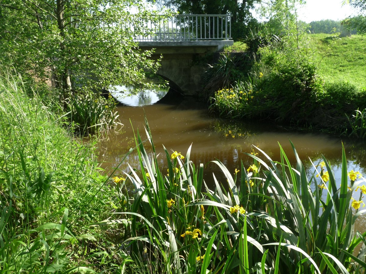 le Beau à Challignac (pont D.24, les Terrodes), limite Salles-de-Barbezieux (vue de l'amont), Charente, France